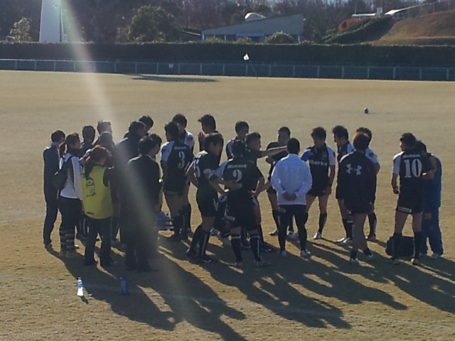 東日本トップクラブ入替戦、三鷹オールカマーズ戦